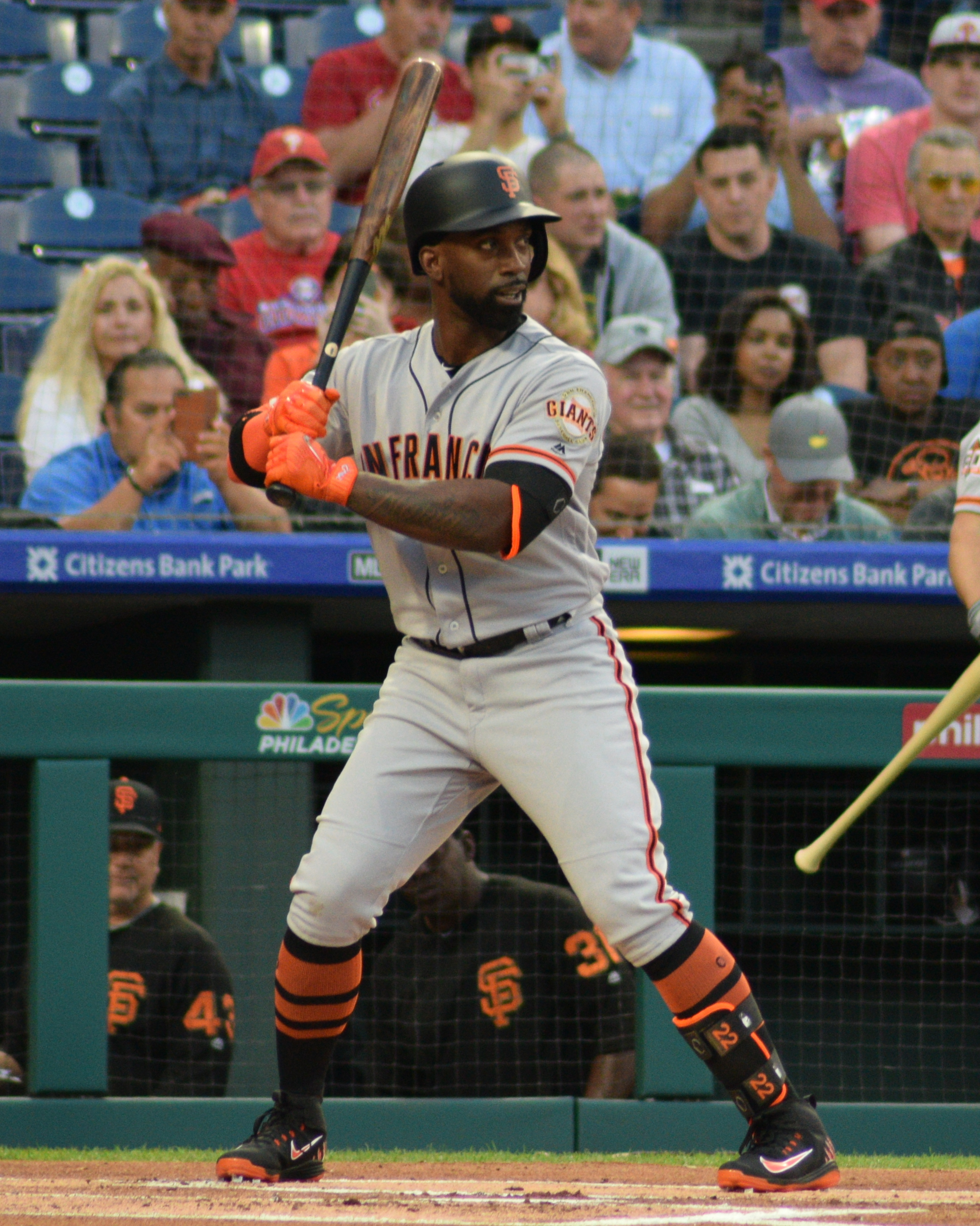 Andrew McCutchen